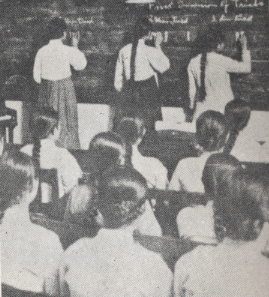 1932년 이화여전 정동시대 수업 장면